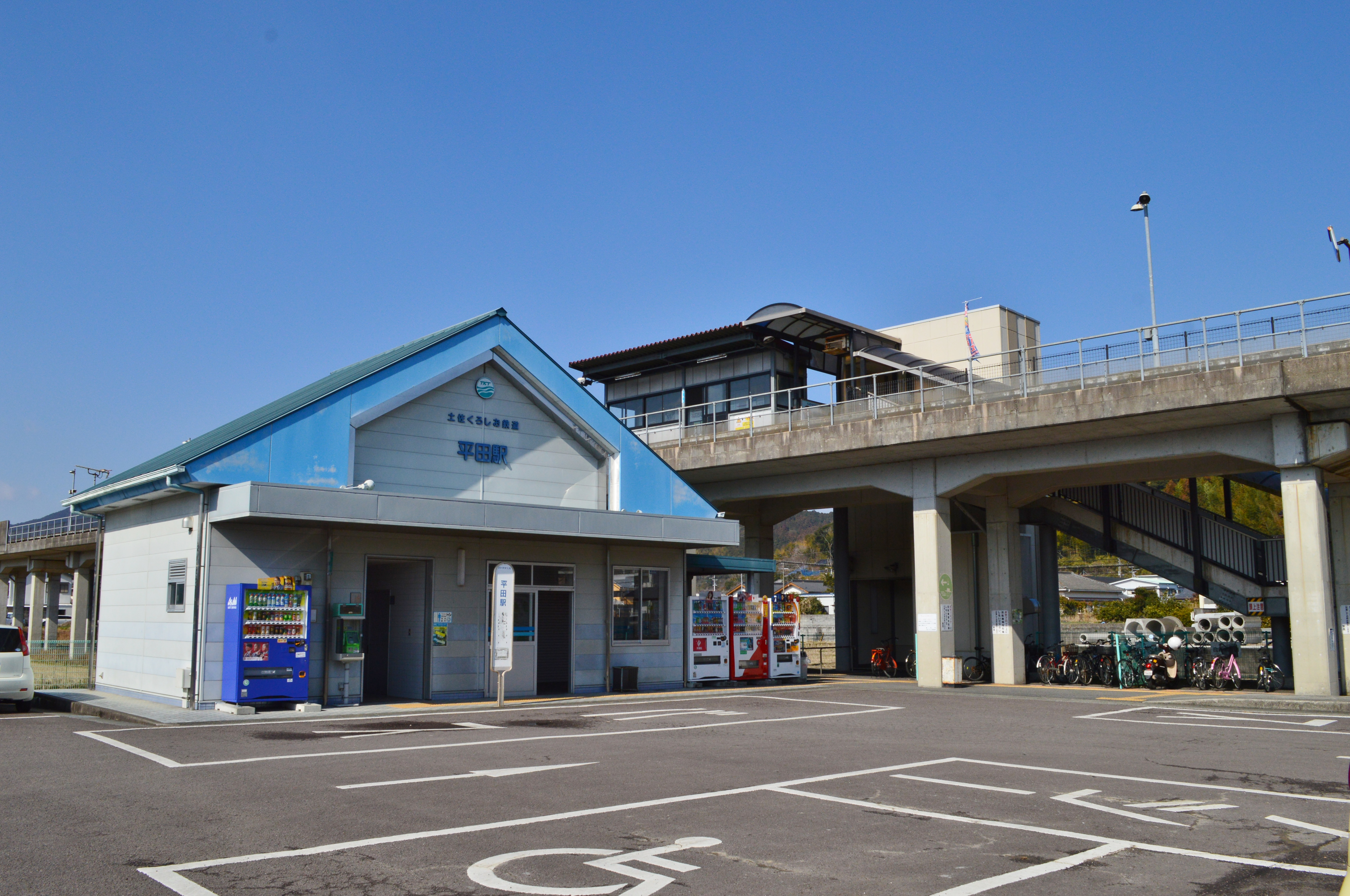 平田駅 (高知県) 駅舎